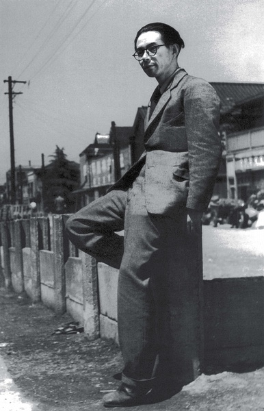 原民喜（1905-1951）、詩人。慶應義塾大学卒業、三田文学で活躍。夏の花を発表。